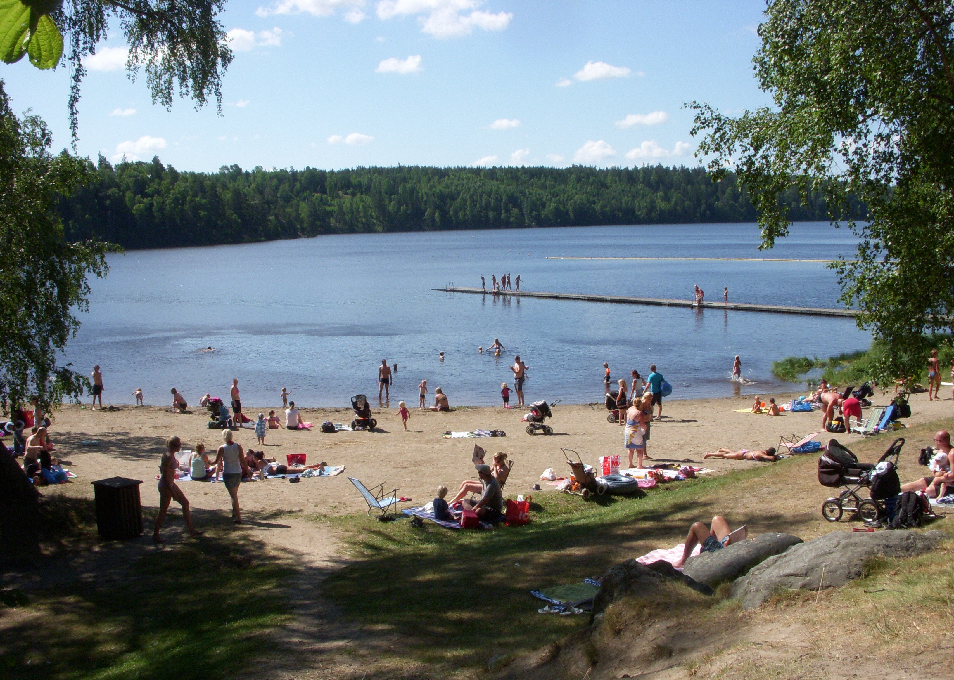 Lidabadet, Lida friluftsgård Botkyrka kommun